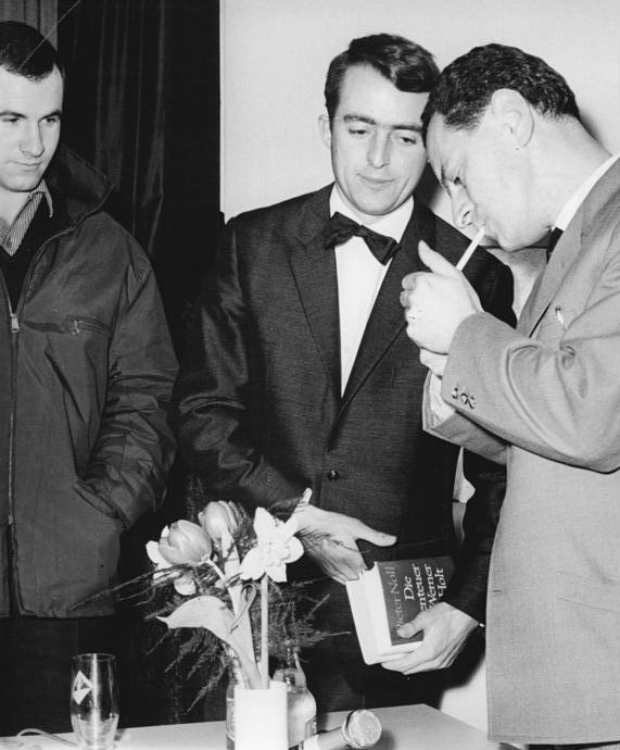 Berlin, Lesung Dieter Noll Zentralbild Kuh-Wo. 16.1.1965 "Ich sehe eine gesellschaftliche Aufgabe in der Literatur", sagte Dieter Noll während seiner Lesung am 15. Januar 1965 vor Westberliner Studenten im Westberliner Studentenheim Siegmundshof. Dieter Noll (auf unserem Bild rechts im Gespräch mit dem Diskussionsleiter) las aus seinen beiden "Werner Holt" Romanen und erhielt für seine Lesung überaus herzlichen Beifall. Abgebildete Personen: Noll, Dieter: Schriftsteller, DDR (PND 119157322)